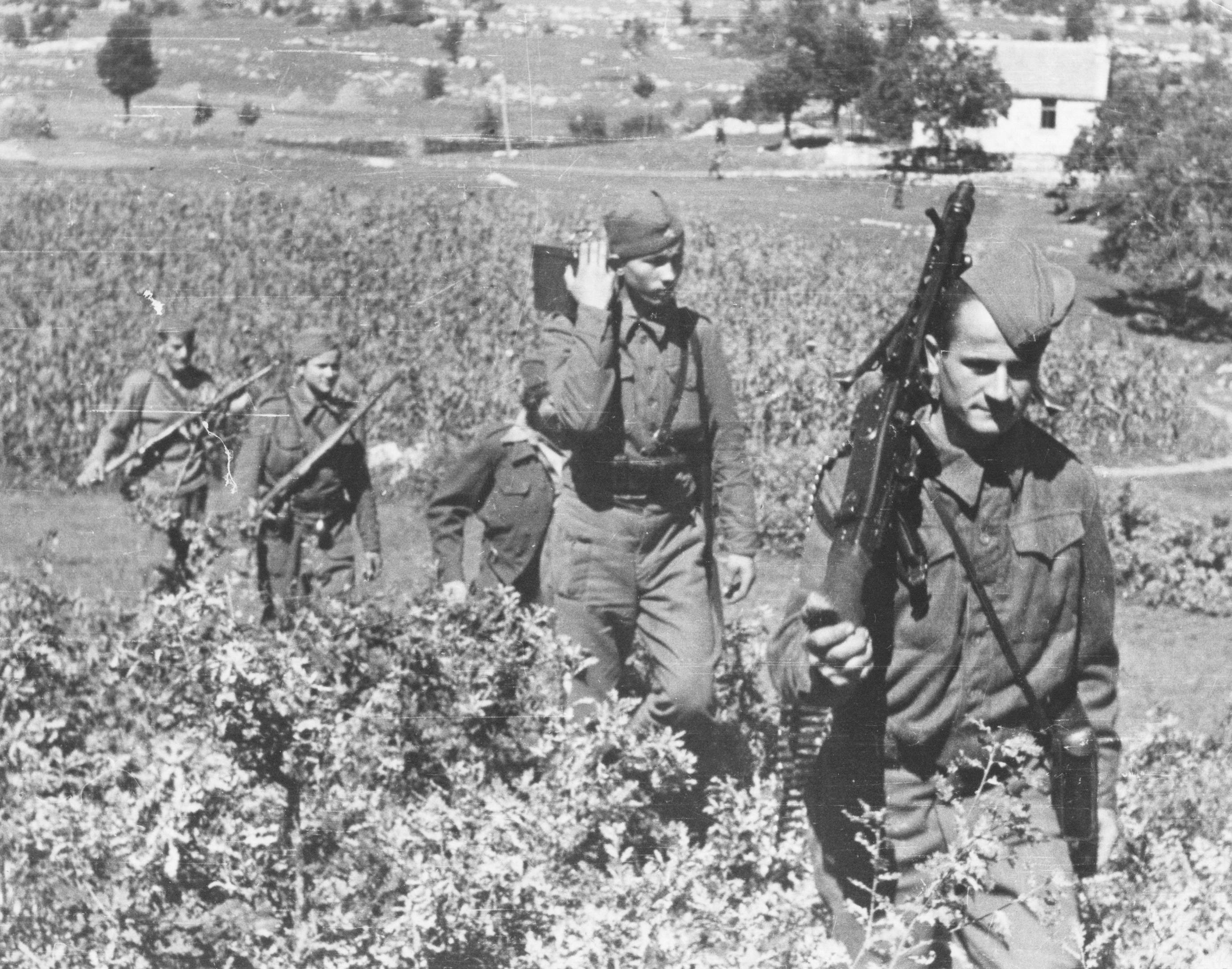 Partigiani della Seconda brigata dalmata in marcia in Montenegro nell'estate 1944